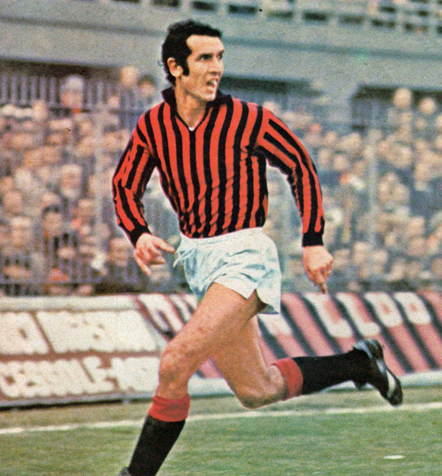 Il calciatore italiano Alberto "Albertino" Bigon in azione al Milan, allo stadio San Siro di Milano, nella stagione 1974-75.